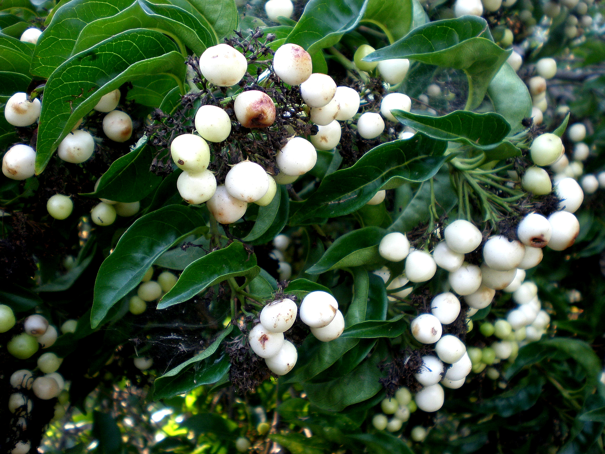 Jardín Botánico de Barcelona.